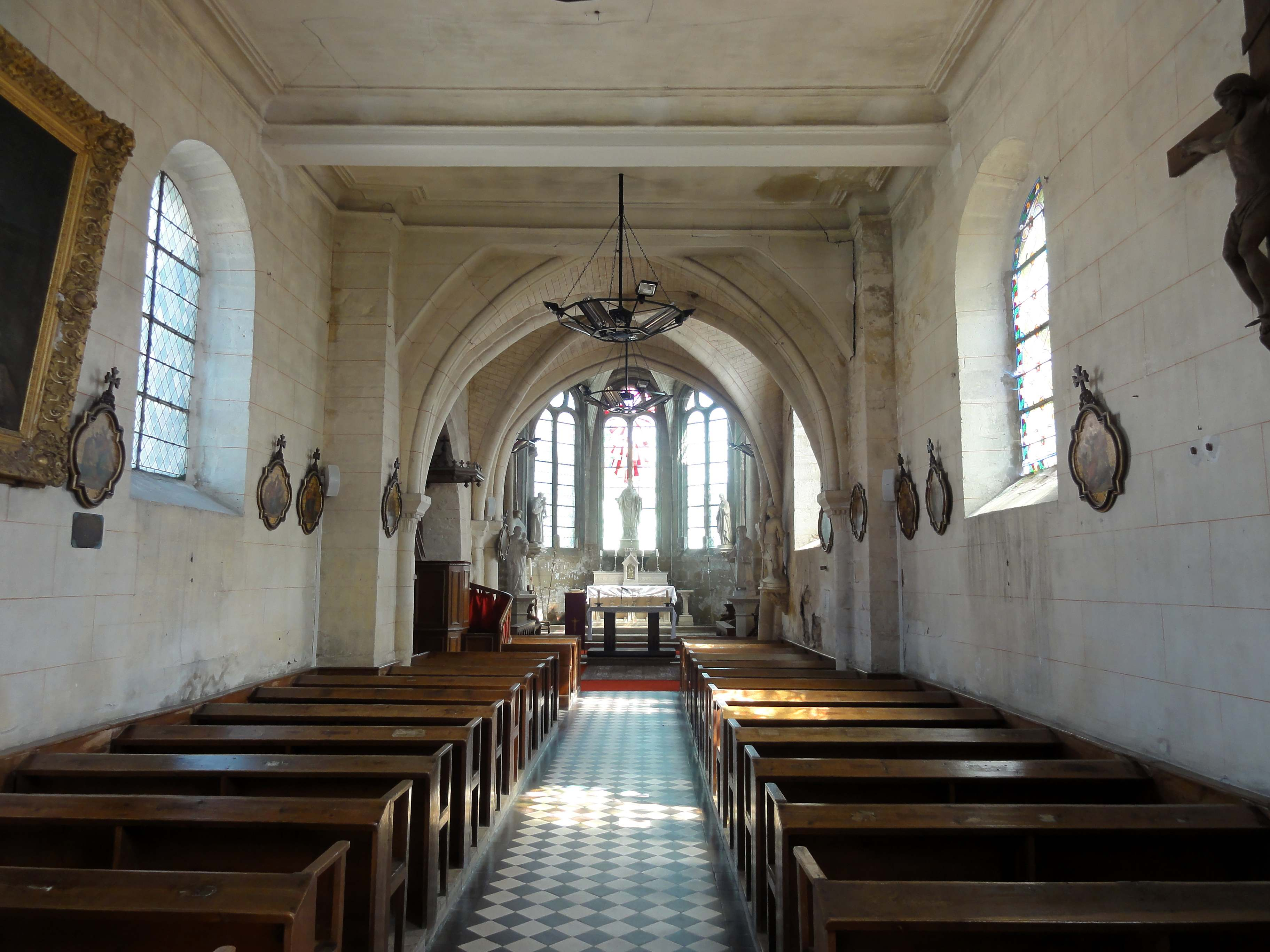 Intérieur de l'église (voir titre).